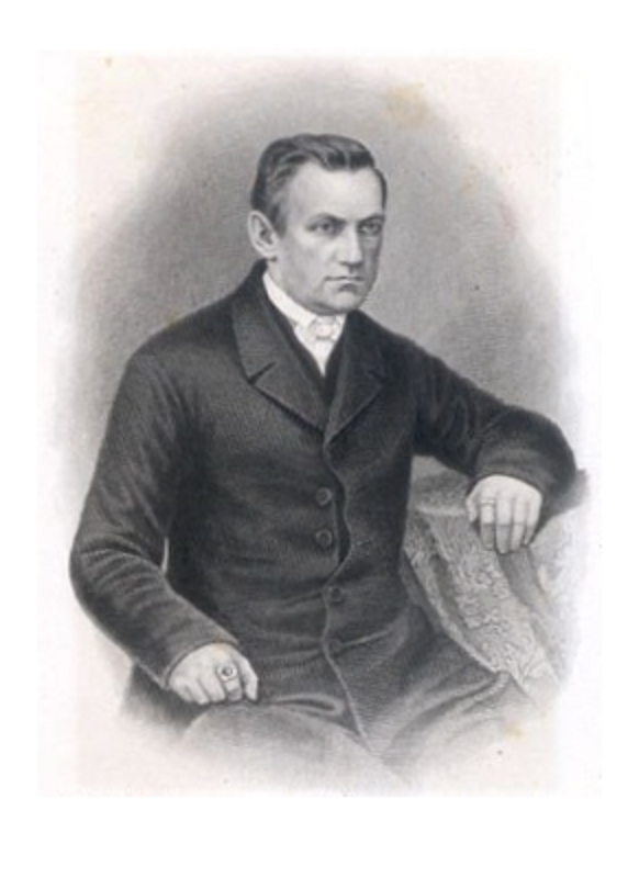 Porträt Carl Eduard Napiersky (Dr. phil. h.c. Karl Eduard von Napiersky) (1793 in Riga – 1864 in Riga). Historiker,(evangelisch). Nach einer älterer Photographie; Stich u. Druck von Weger in Leipzig; Verlag von W. F. Häcker in Riga